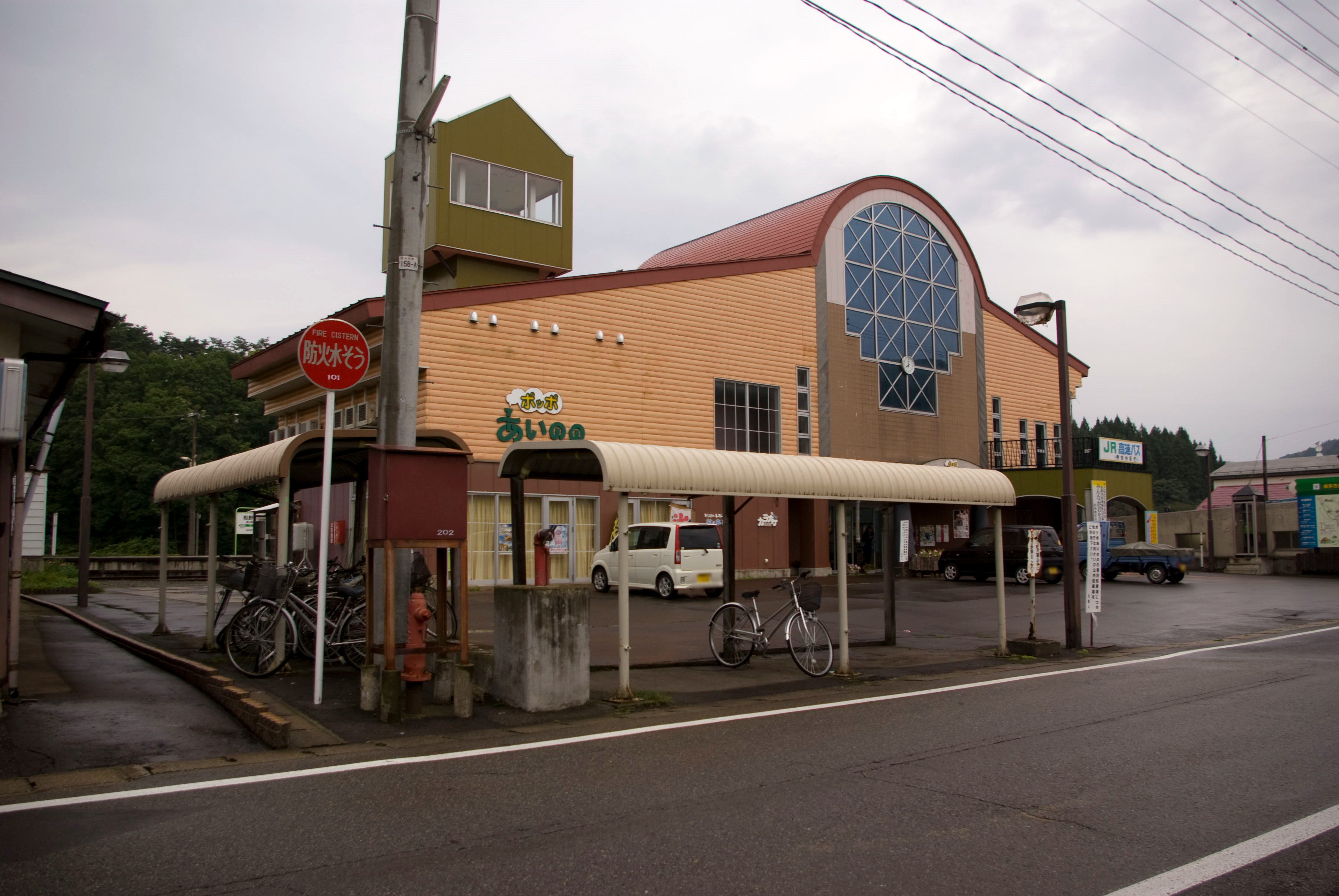 東日本旅客鉄道株式会社北上線相野々駅